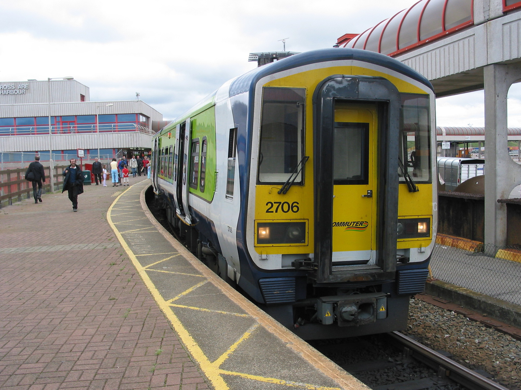 IE 2706 at Rosslare habour